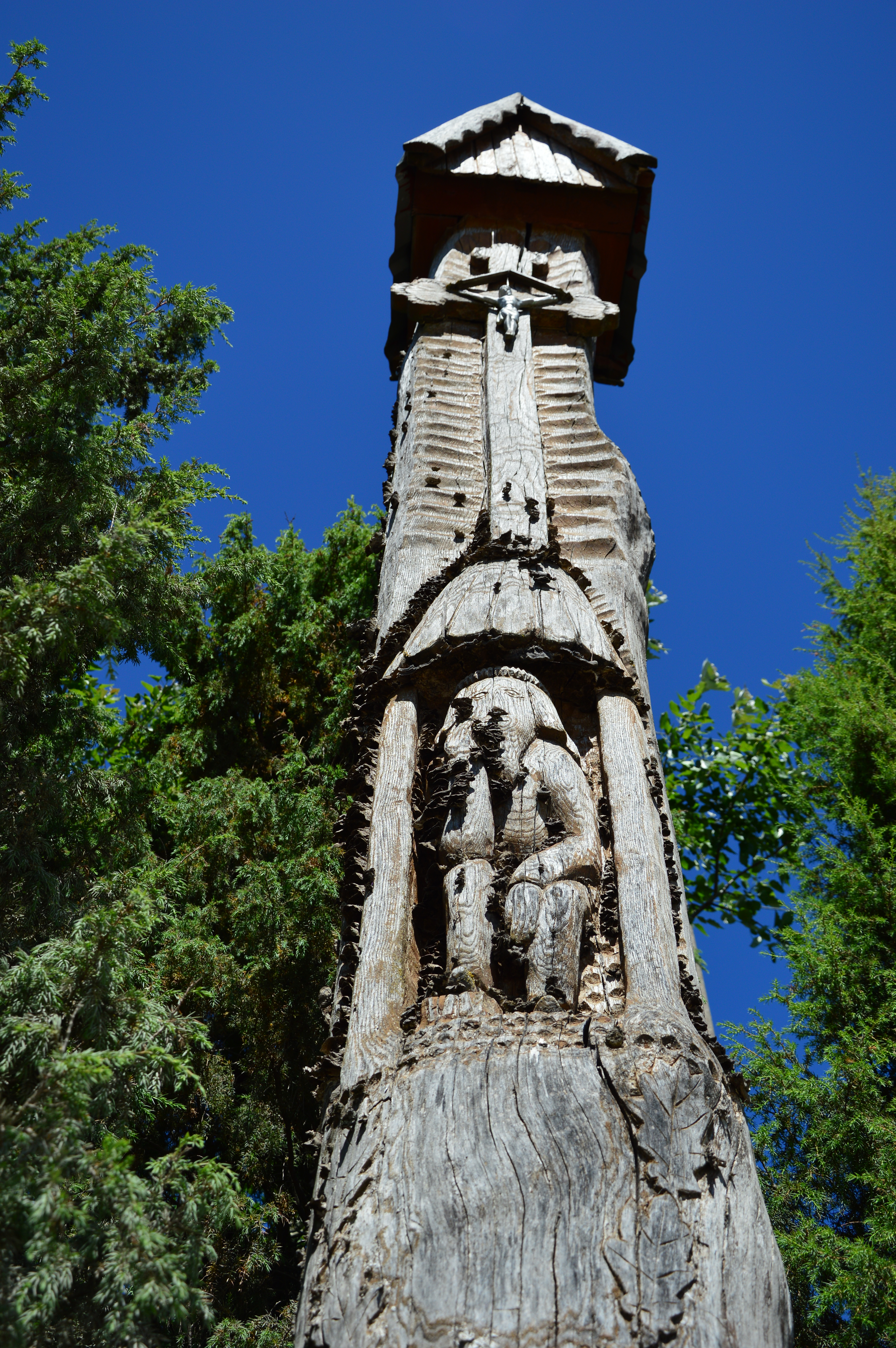 Randasi Daužnagių kaime